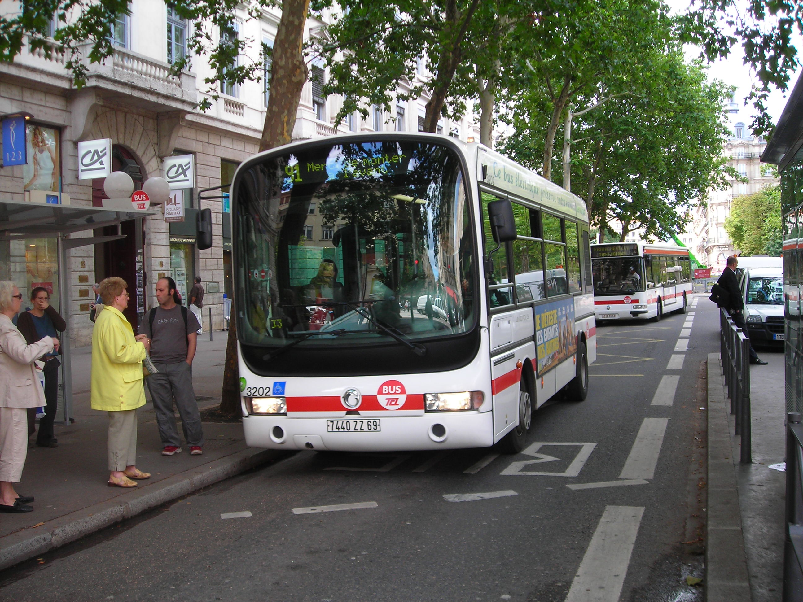 Midibus électrique Irisbus Europolis des TCL de Lyon à l'arrêt Bellecour.